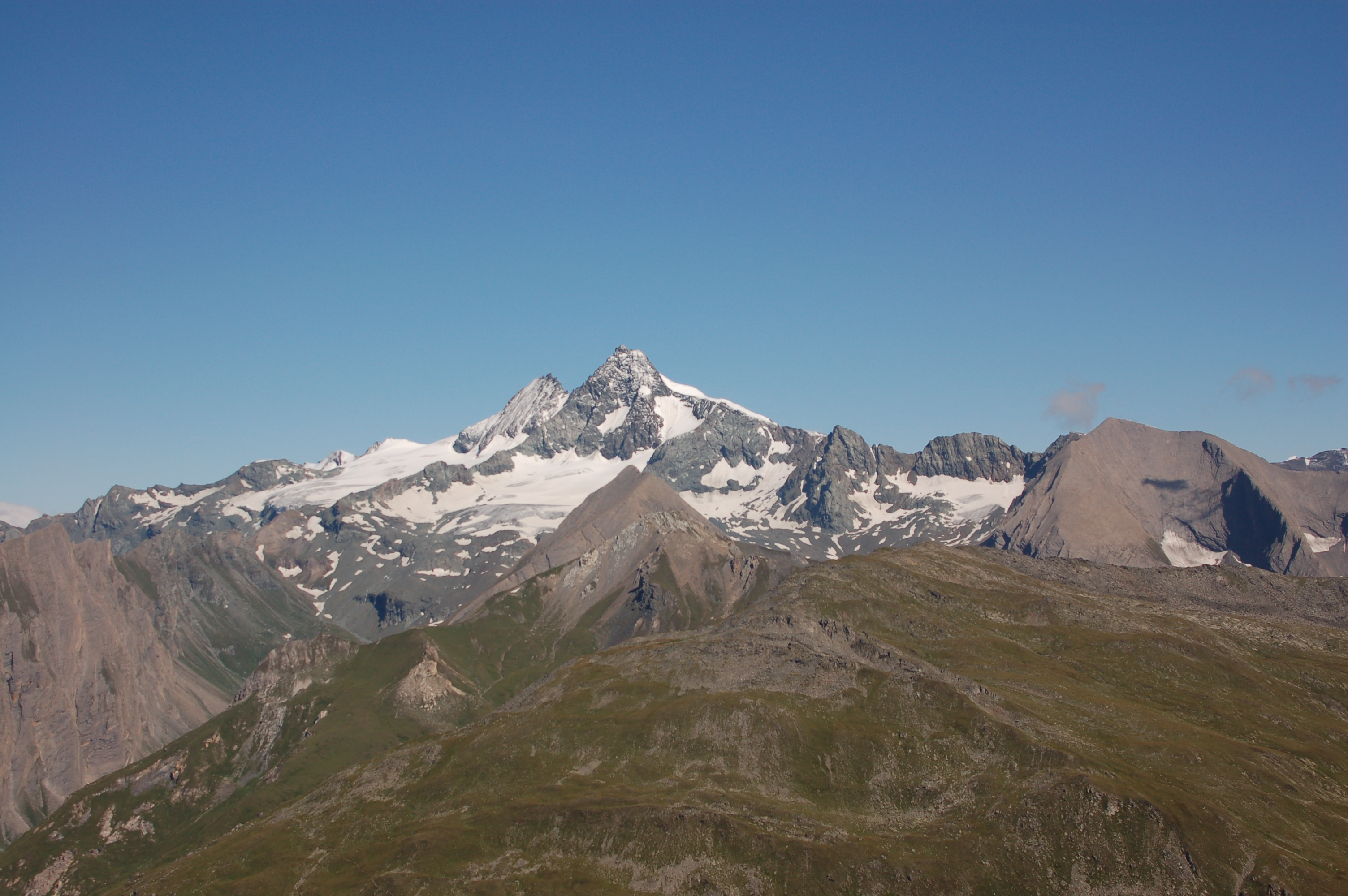 Die Glocknergruppe von Süden